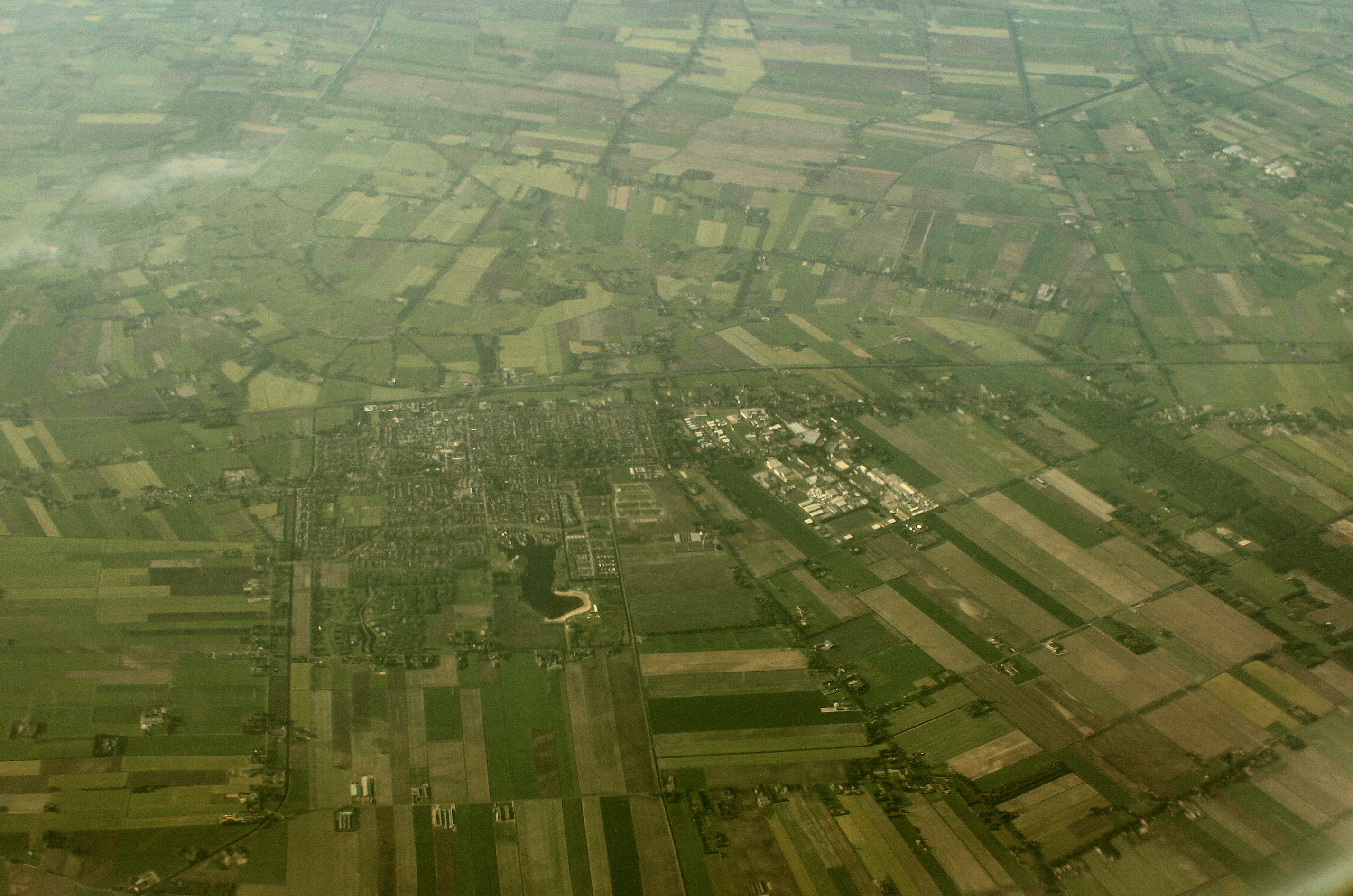 Dedemsvaart, gezien naar het noorden.